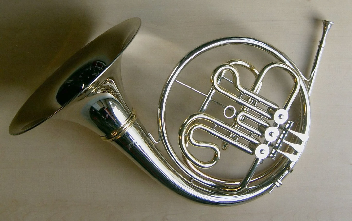 B-Waldhorn in Vorderansicht (Bearbeitung smial 15:47, 5 December 2006 (UTC))